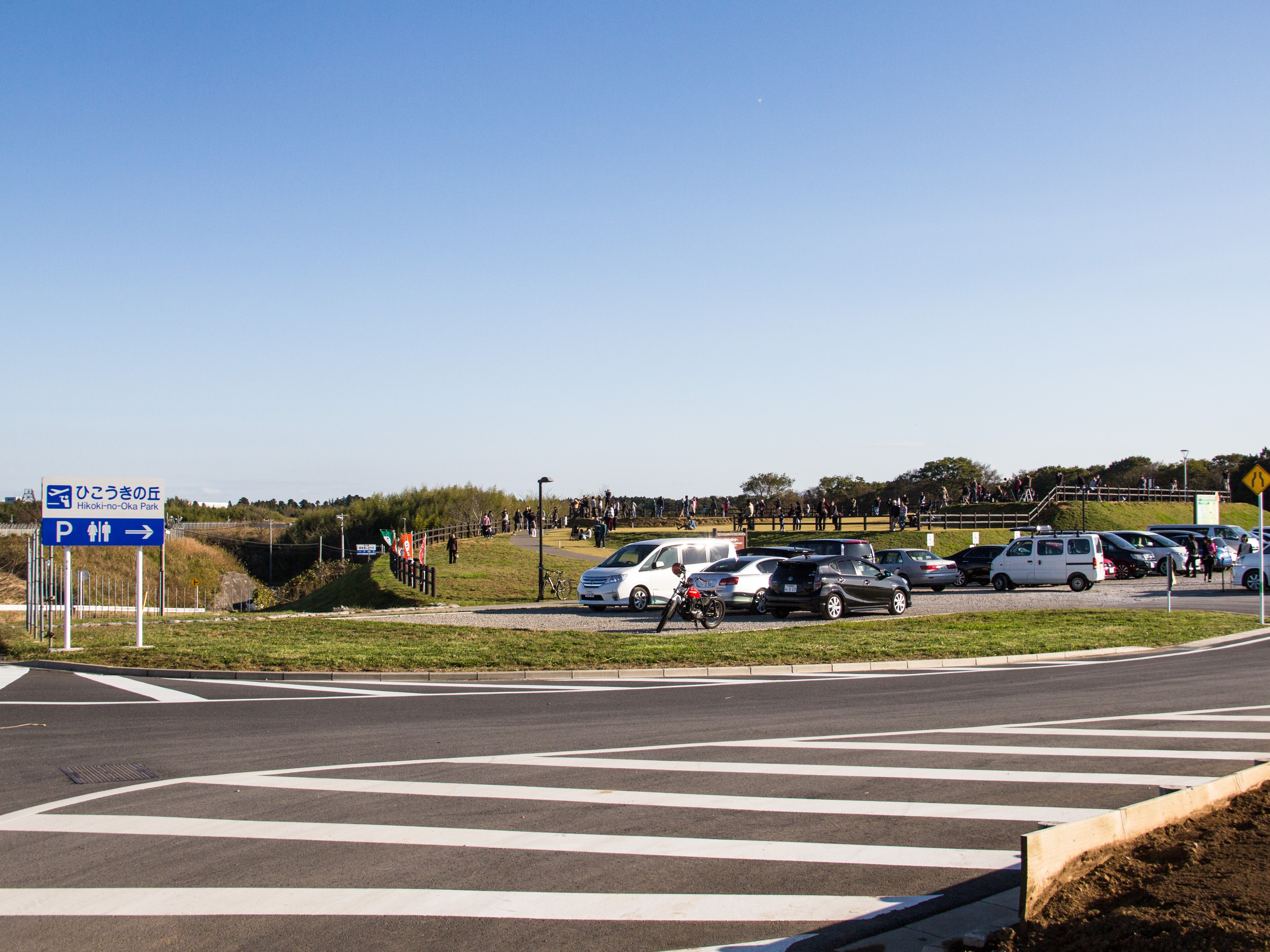 飛行機の丘